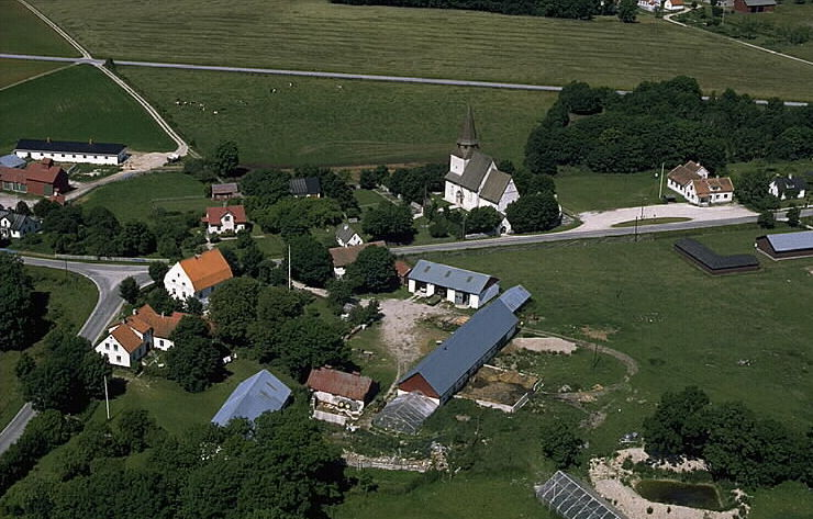 Motiv: Bäls kyrka Nyckelord: Flygbilder, Riksintressen Kategori: Kyrkby Bäls kyrka. Länsväg 147 går förbi norr om kyrkan.